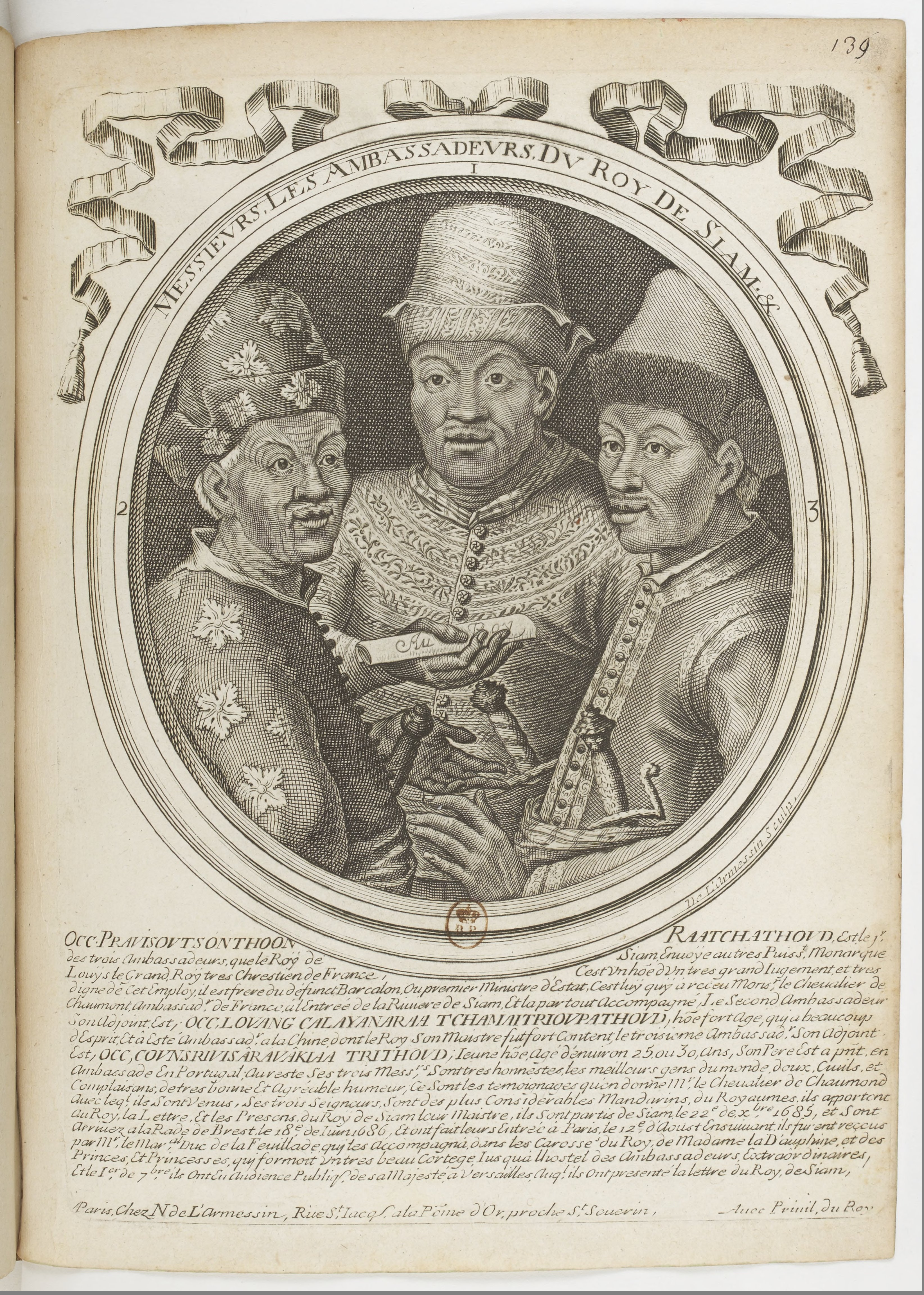 Les augustes représentations de tous les rois de France, depuis Pharamond jusqu'à Louis XIV,... avec un abrégé historique sous chacun, contenant leurs naissances, inclinations et actions plus remarquables pendant leurs règnes